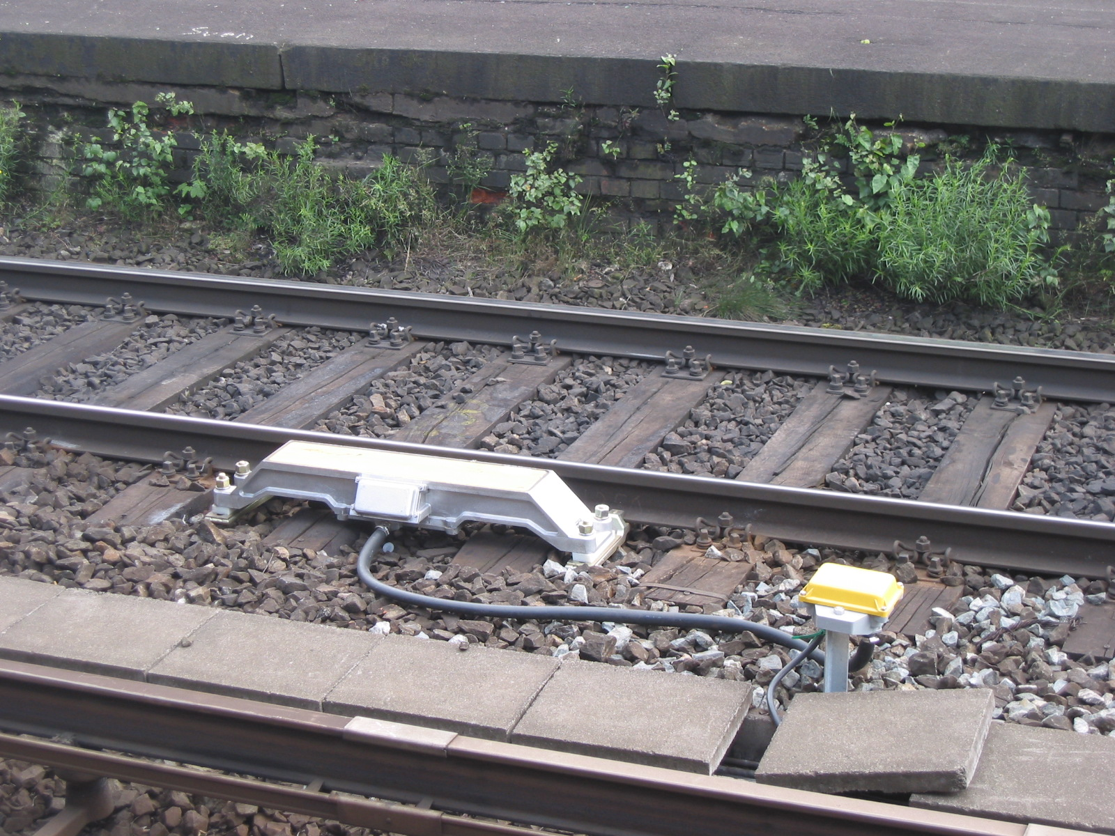 PZB-Gleismagnet 500JHz, große Bauform (Siemens), Nachbau des Signalwerkes Wuppertal